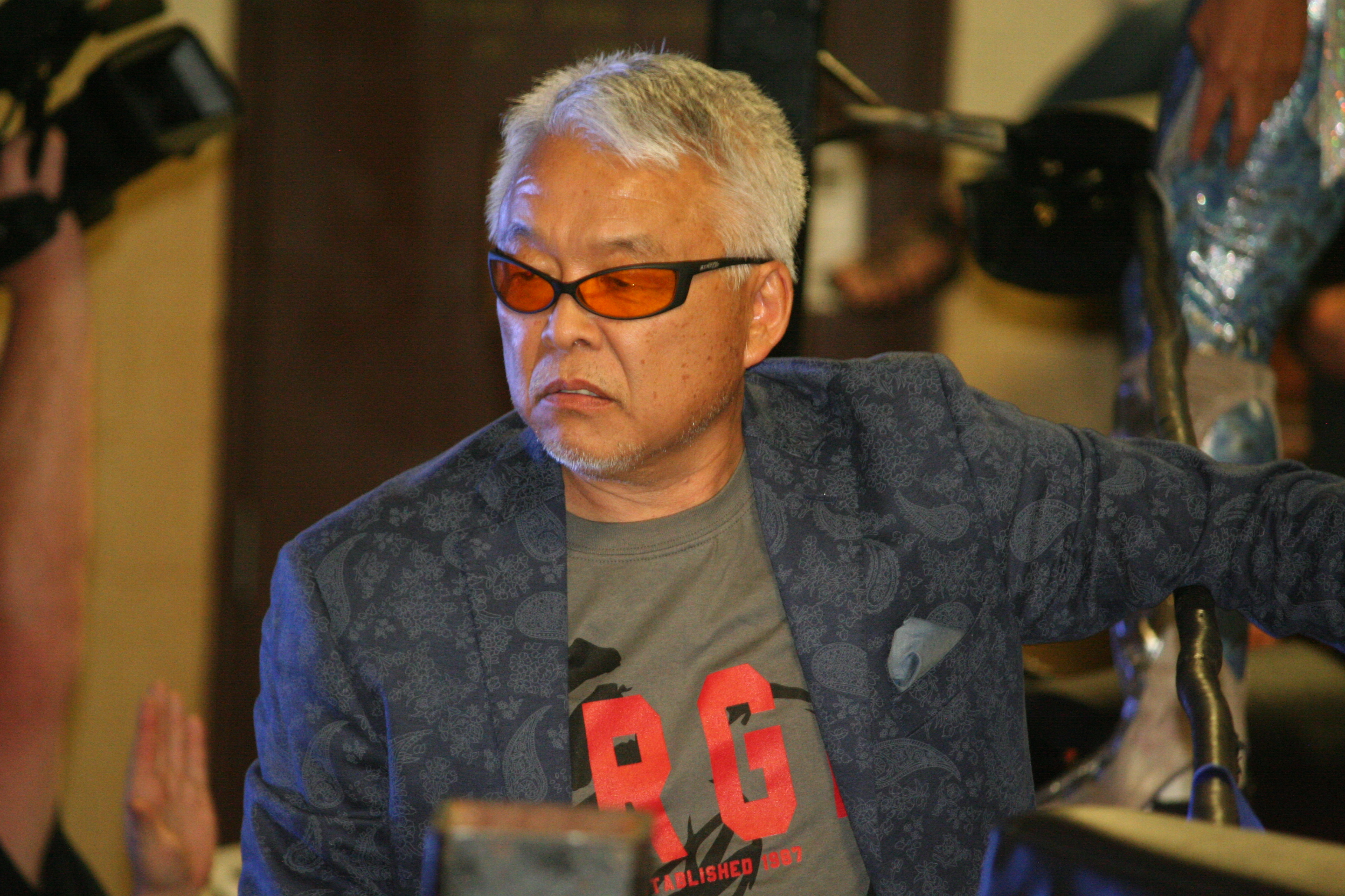 Le manager de catch Sonny Onoo en 2018.